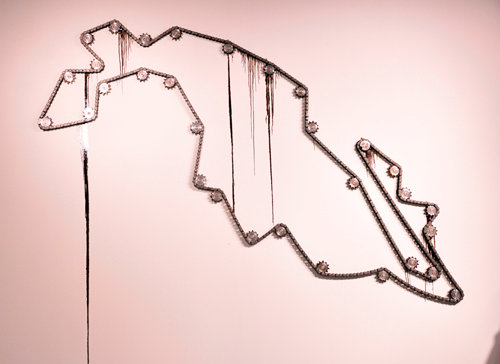 Muestra de la instalación "I Machinarius" de la artista mexicana Marcela Armas para la exhibición colectiva "Contra-Flujo" en el Rubin Center de El Paso, Texas.